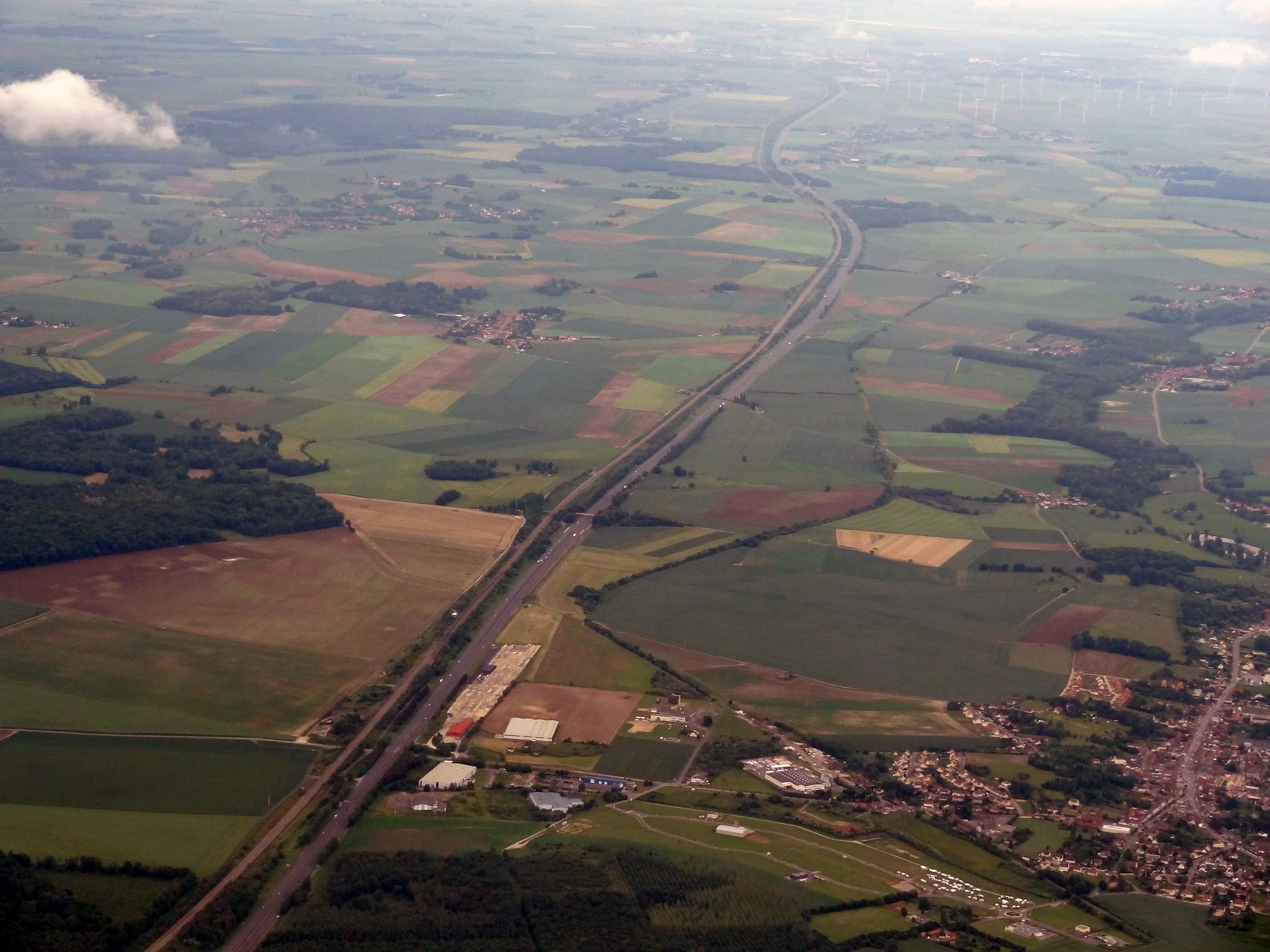 Vue aérienne de l'autoroute A1 et de la LGV Nord à Ressons-sur-Matz (Oise), France. Vue en direction du nord.